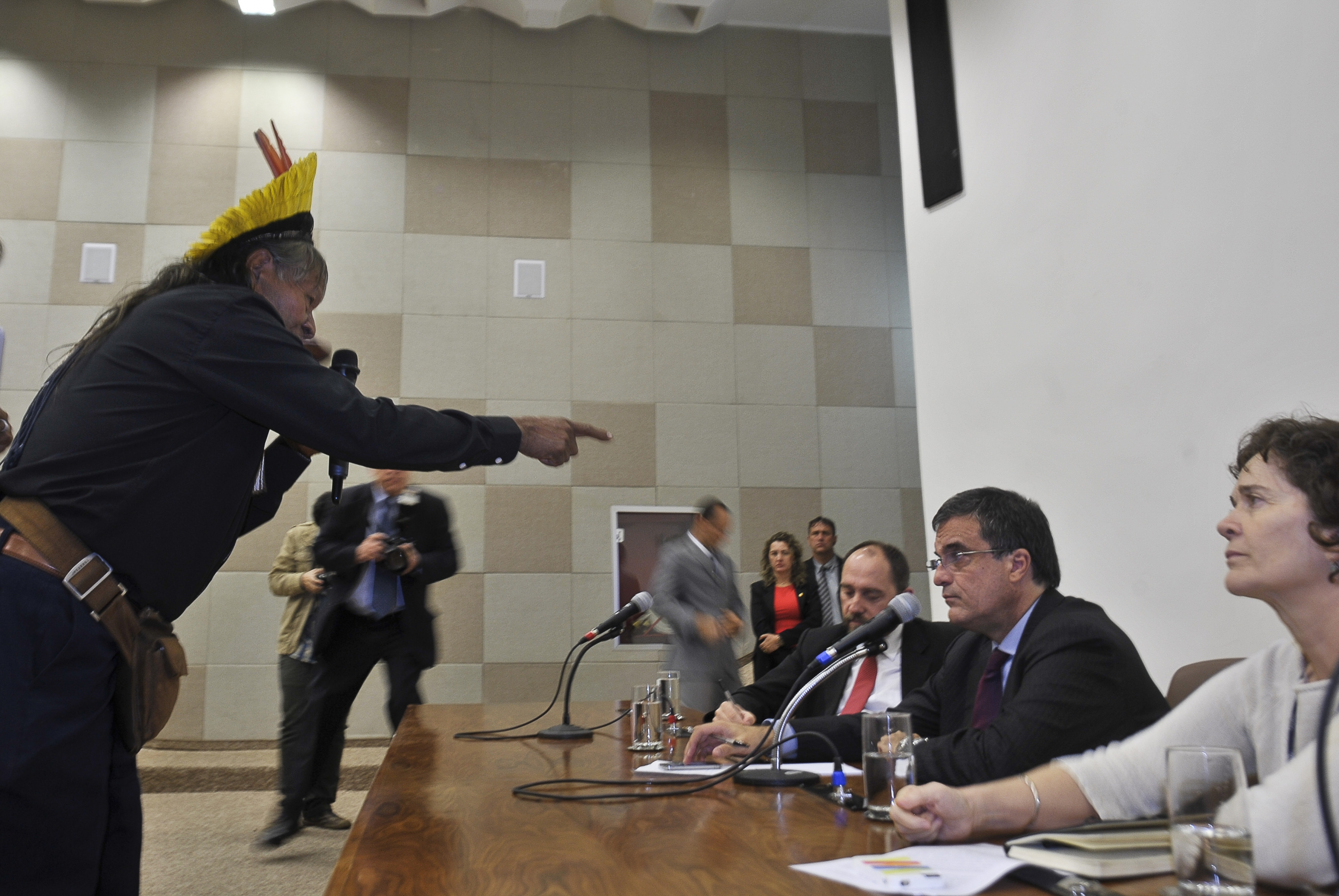 Brasília - Lideranças da Articulação dos Povos Indígenas do Brasil (APIB), entidade que representa nacionalmente os povos indígenas brasileiros, são recebidas pelo Ministro da Justiça, José Eduardo Cardozo, o Advogado Geral da União, Luís Inácio Adams e a presidenta da Funai, Marta Maria Azevedo. O Movimento Indígena luta pela revogação da Portaria 303, publicada pela Advocacia Geral da União em 16 de julho de 2012